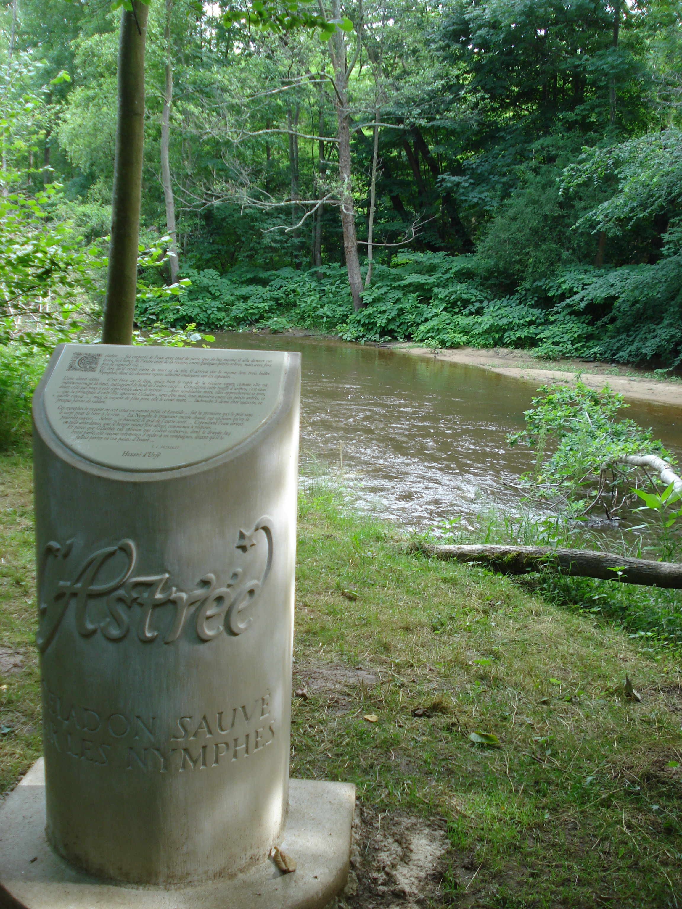 Chemins de l'Astrée, Hameau d'Astrée à coté de La Bâtie d'Urfé (Saint-Étienne-le-Molard, Loire, France) Foothpath along the Lignon du Forez near La Batie d'Urfé, inspired by L'Astrée, roman d'Honoré d'Urfé.